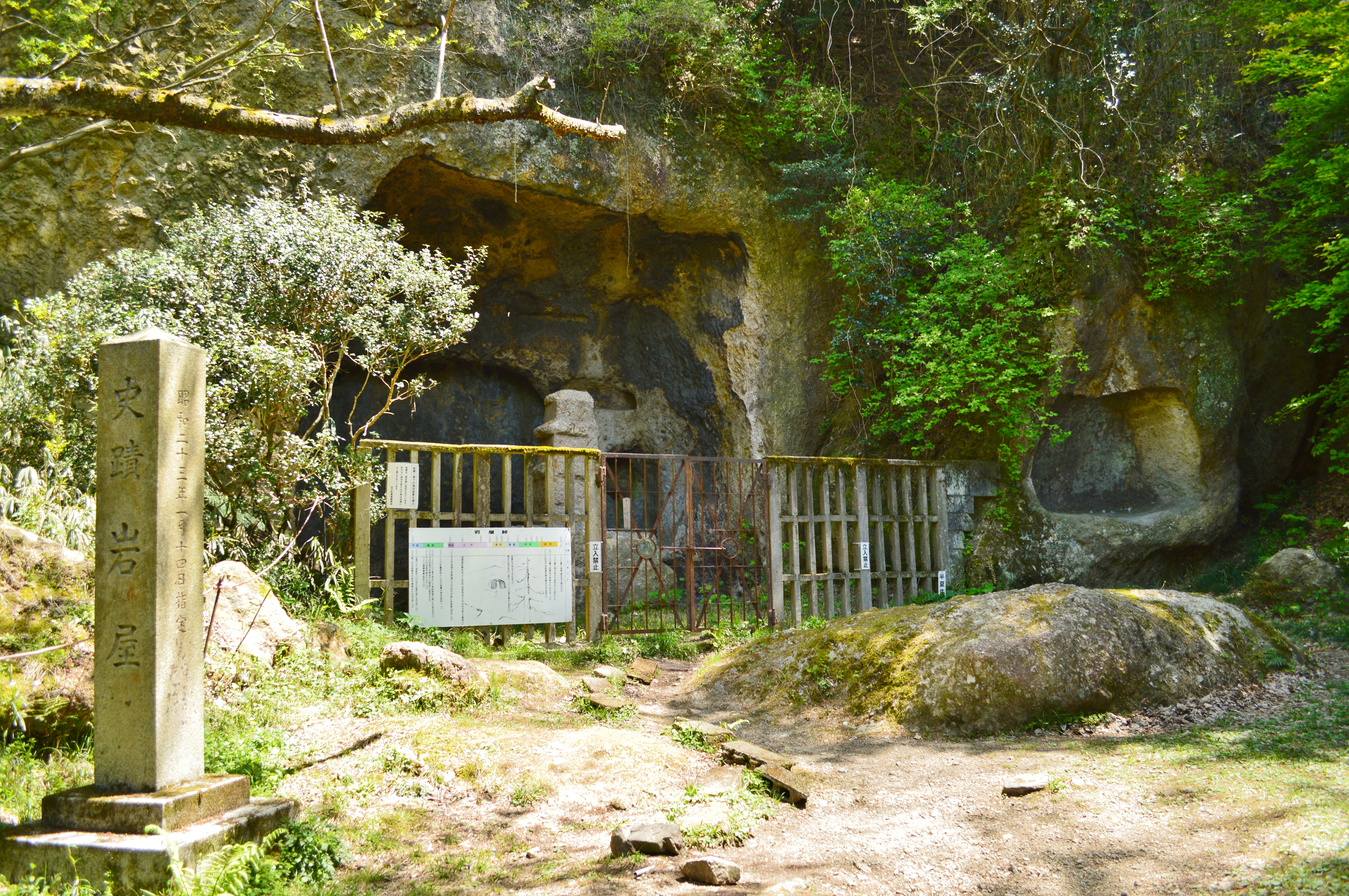 岩屋 (大阪府太子町) 概観